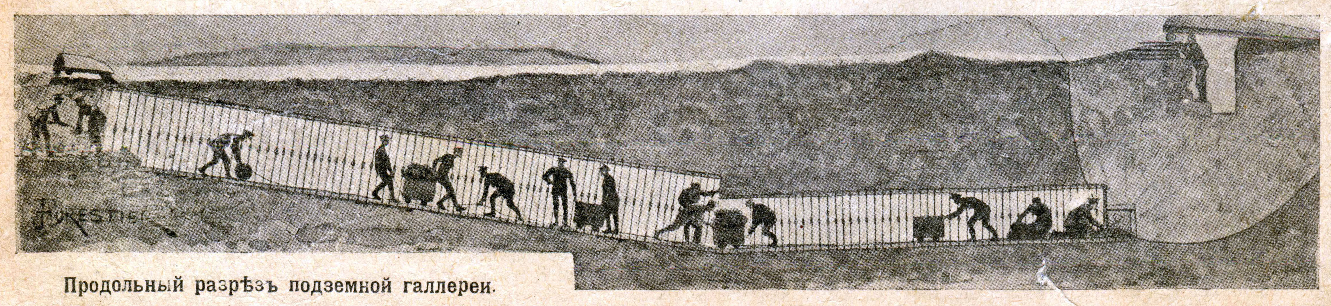 Продольный разрез минной галереи. Рисунок из журнала "Природа и люди" Сойкина (иллюстрированный журнал науки, искусства и литературы) № 30 от 28 мая 1915 года.